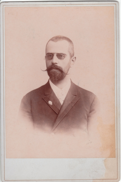 Сергей Васильевич Лазаревский (28 августа 1859 г.[16] — 9 января 1917) — статский советник, заведующий канцелярией Нижегородского удельного округа.